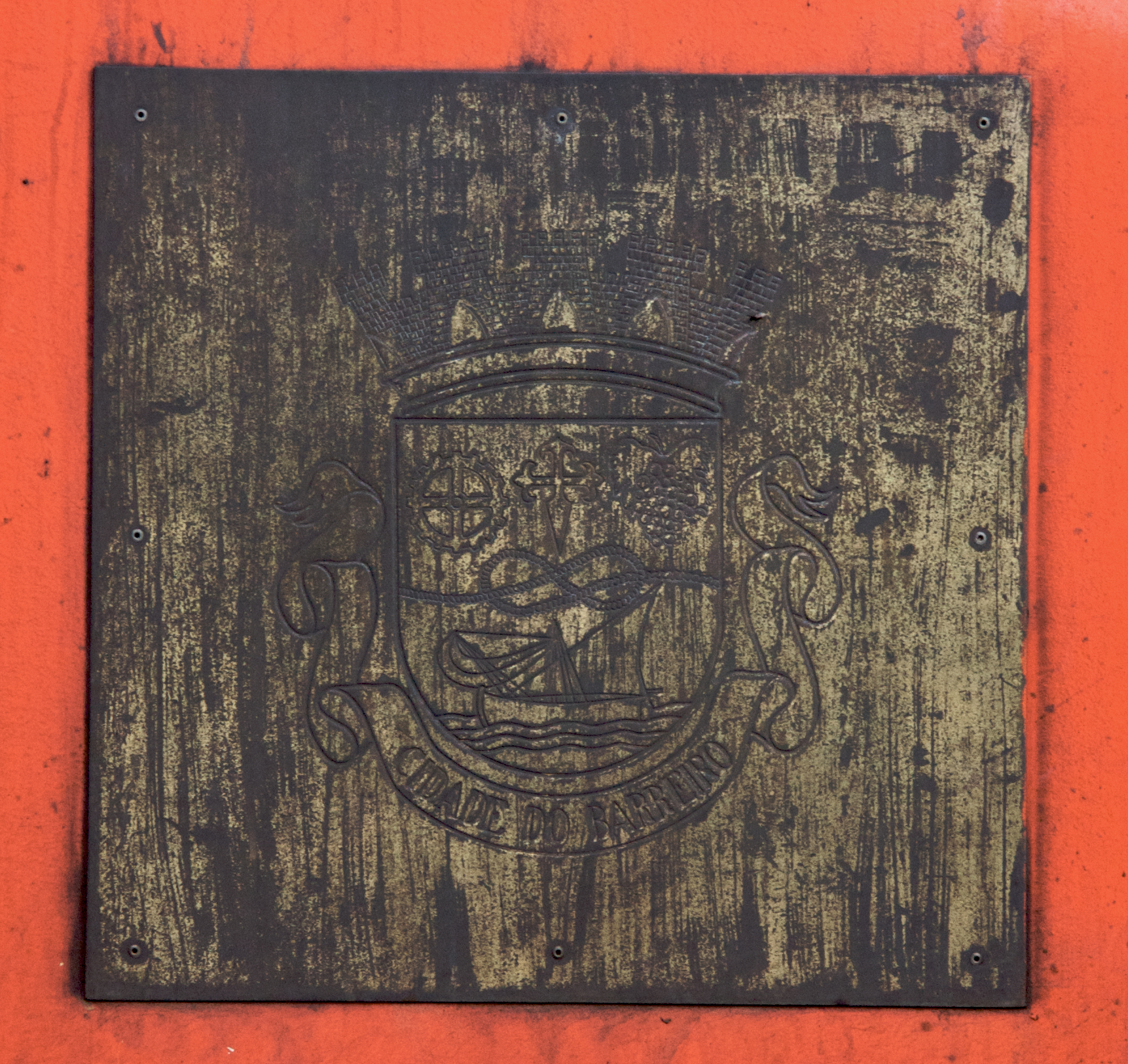 ou melhor, pormenor da placa que lhe dá o proletário nome. Local: Entroncamento (EMEF-GOE) [Linha do Norte, PK 106] Data e hora: 1 de Novembro de 2008 [17h07] Material: Locomotiva 1935 Barreiro [Alsthom • Sorefame] N.º UIC: 9094 122 1935-6